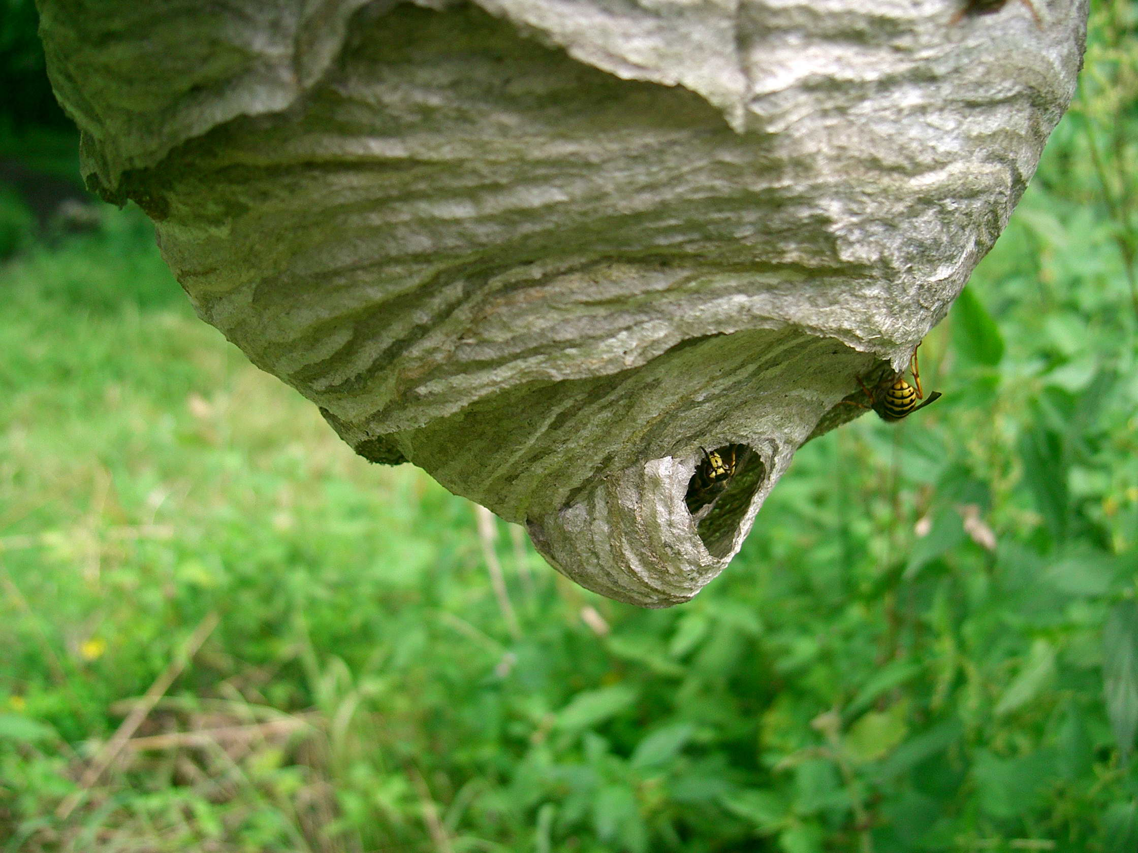 Nest der Sächsischen Wespe (Dolichovespula saxonica) an einem Streckenfernsprecher der Strecke Nossen–Moldau im Zellwald